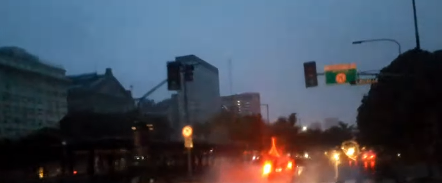 La Ciudad Autónoma de Buenos Aires sin luz tras el apagón.